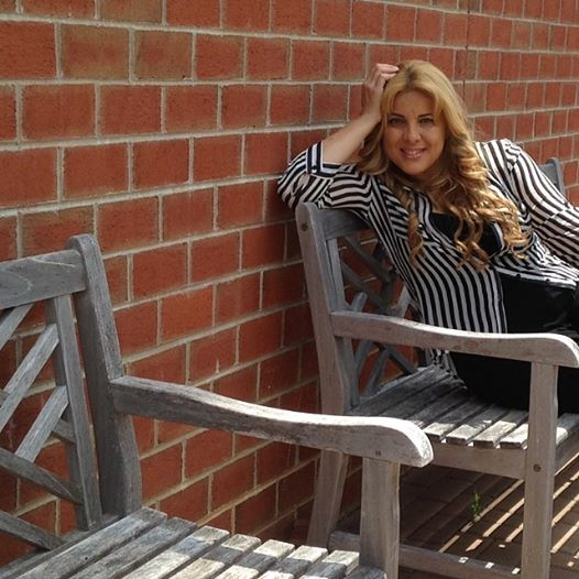 Maritza Medina en las afueras del estudio de Esperanza TV en Washington DC Junio 2014